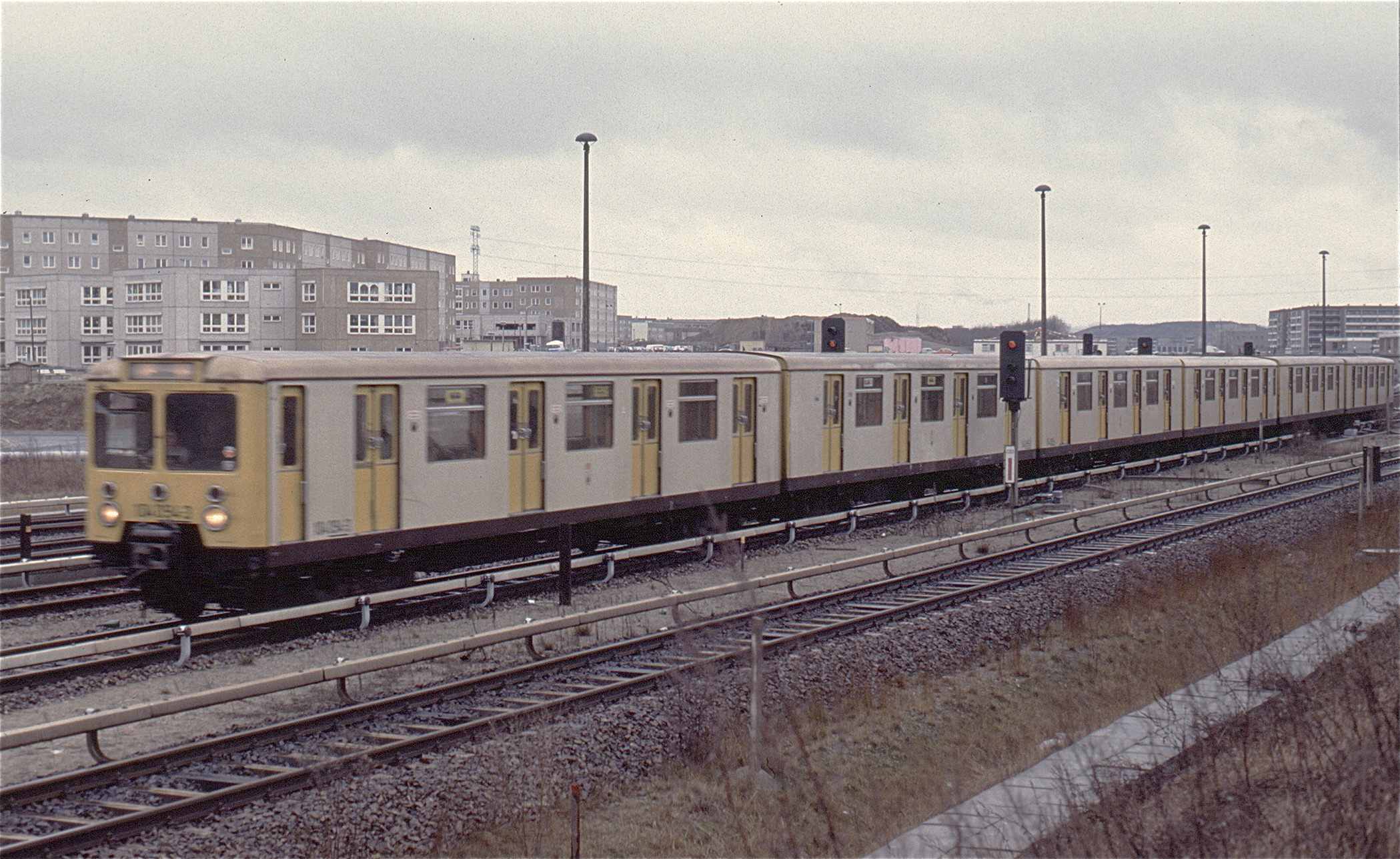 U-Bahn Berlin, EIII-Zug der 4. Lieferserie